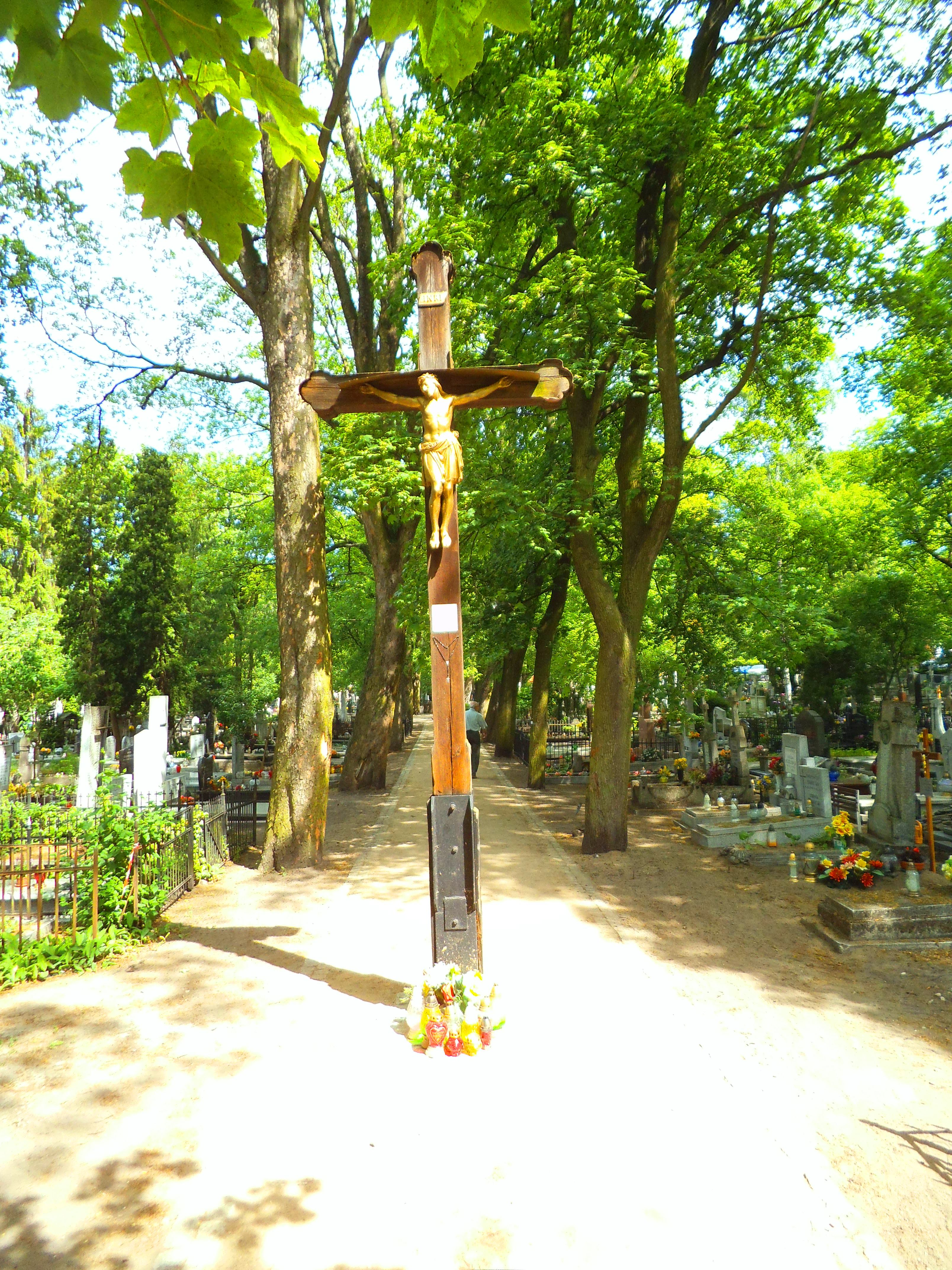 Cmentarz św. Jerzego w Toruniu2015